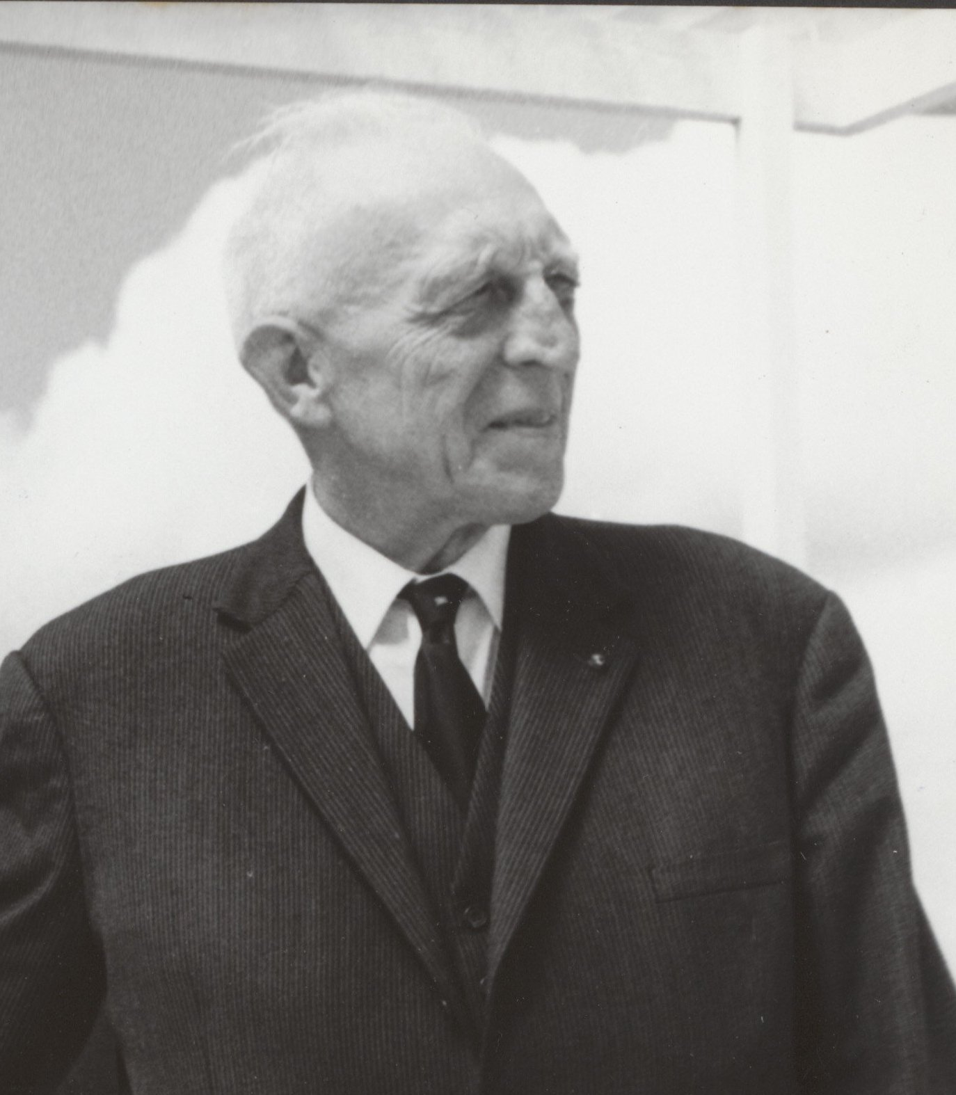 Collectie / Archief : Fotocollectie Elsevier Reportage / Serie : [ onbekend ] Beschrijving : burgemeesters, openingen, pijpleidingen, Hall, Gijs van, Strumphler J.H., Visser J.J.m. Datum : 8 juli 1967 Locatie : Amsterdam, Diemen Trefwoorden : burgemeesters, openingen, pijpleidingen Persoonsnaam : Hall, Gijs van, Strumphler J.H., Visser J.J.m. Fotograaf : Fotograaf Onbekend / Anefo Auteursrechthebbende : Nationaal Archief Materiaalsoort : Foto (zwart/wit) Nummer archiefinventaris : bekijk toegang 2.24.05.02 Bestanddeelnummer : 081-1233